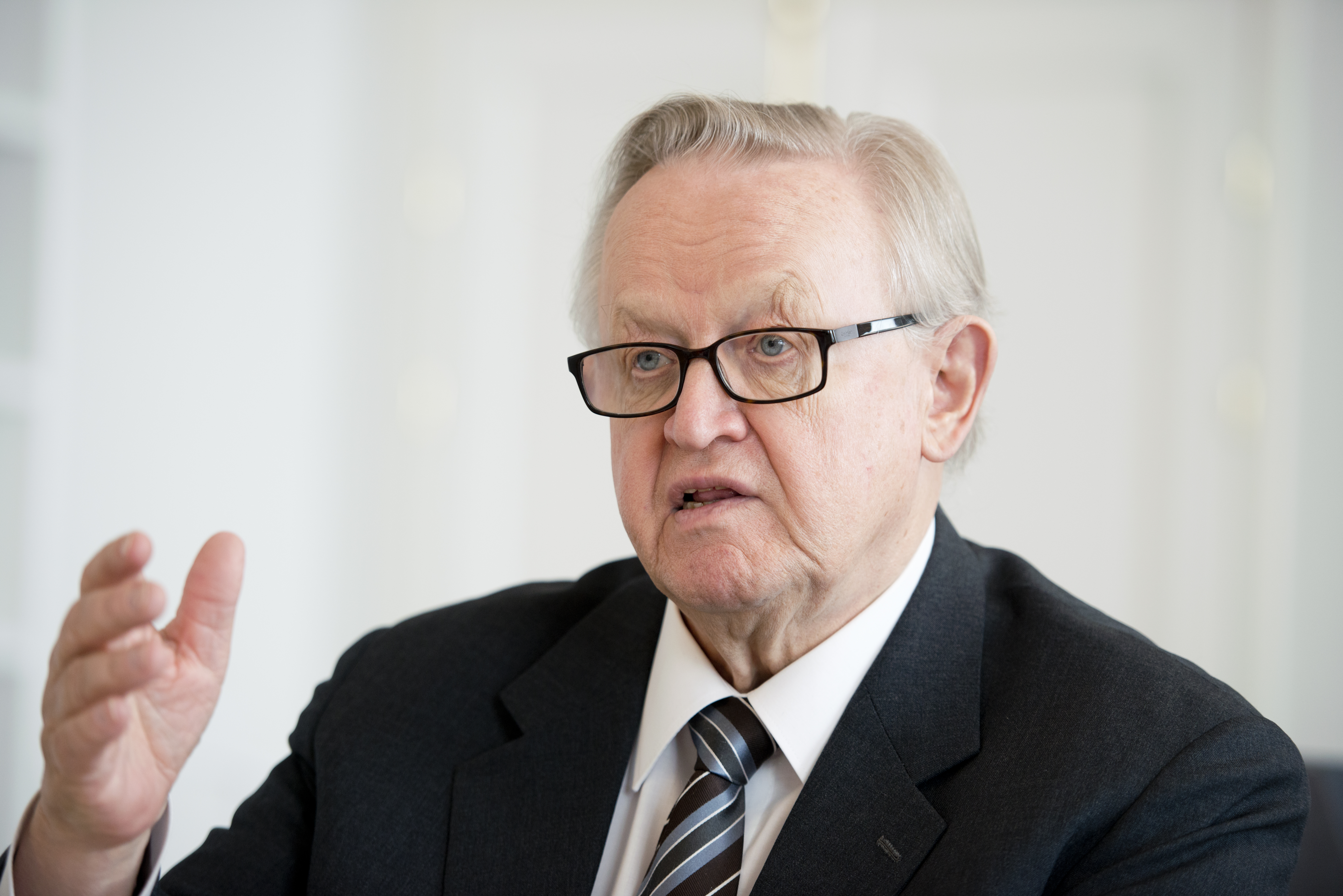 Martti Ahtisaari, tidigare president Finland och mottagare av Nobels fredrspris.